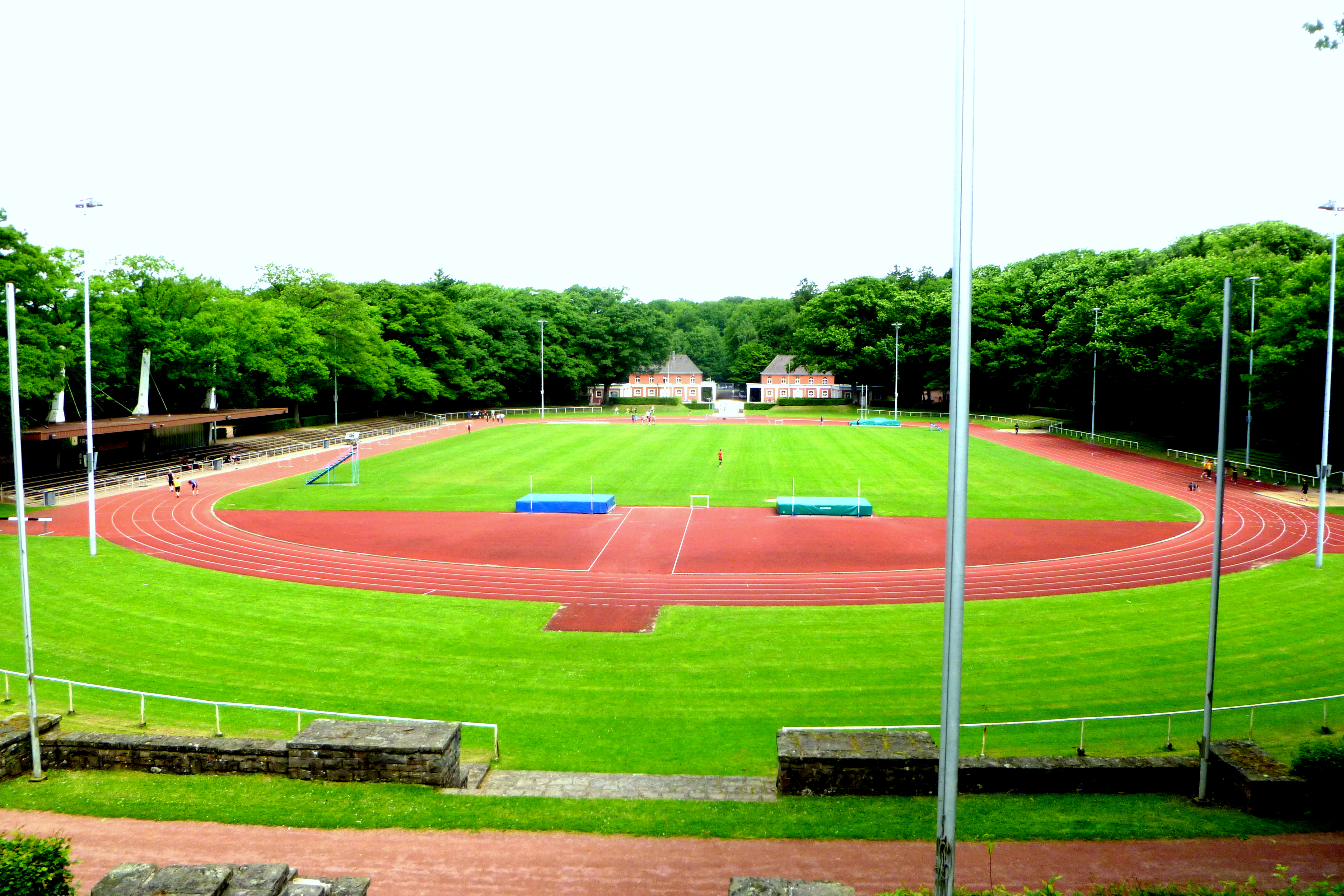 Waldstadion Aachen - Gesamtansicht